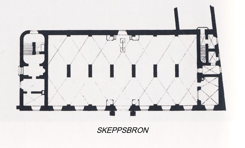 Tullhuset vid Skeppsbron i Gamla stan, planritning